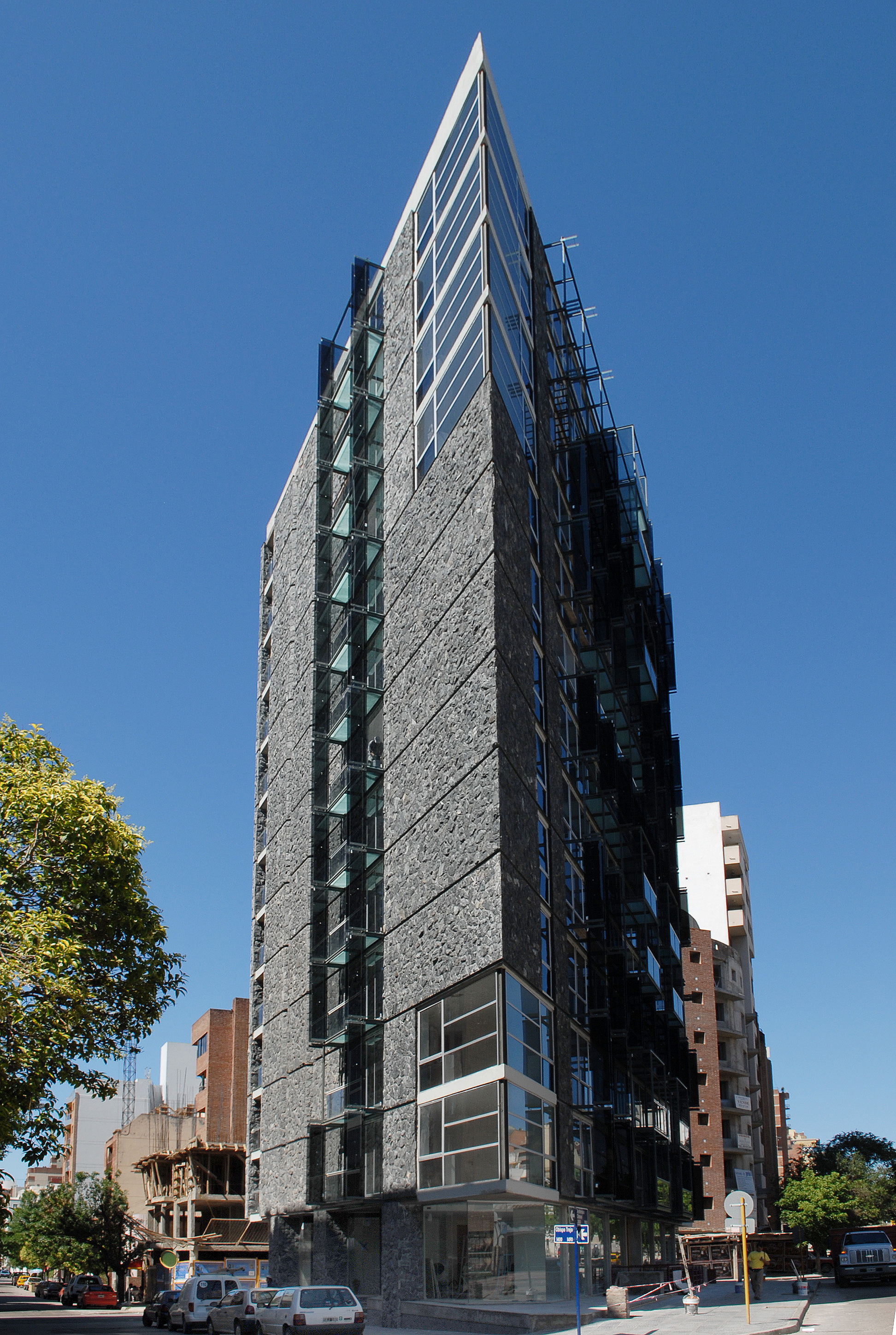 Edificio Gernika. Av. Ambrosio Olmos 950, Ciudad de Córdoba, Argentina.